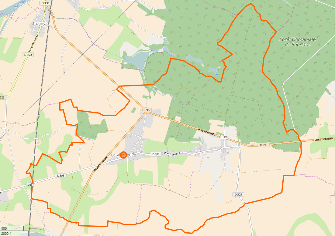 Karte der Gemeinde Clux-Villeneuve - INSEE-Code 71578 Carte de la commune de Clux-Villeneuve - Code INSEE 71578 This map may be incomplete, and may contain errors. Don't rely solely on it for navigation.